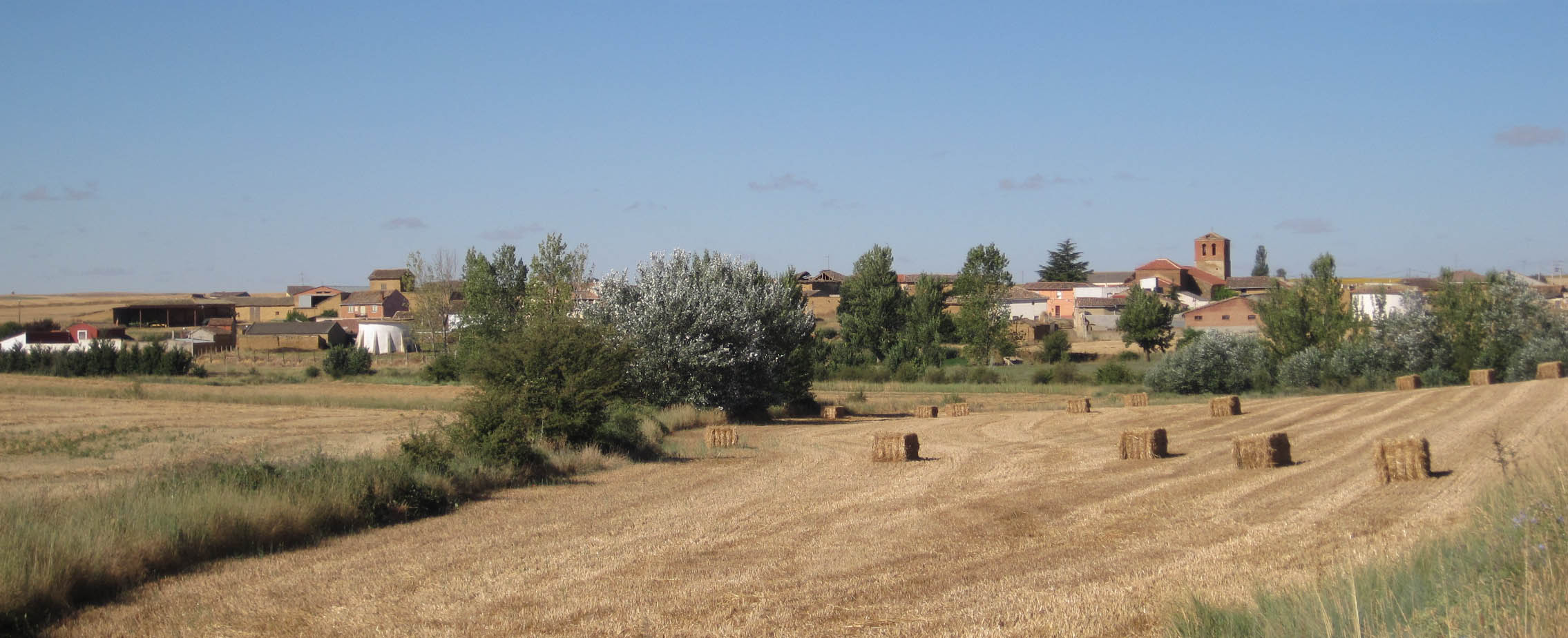 Vista general de Pozo de Urama (Palencia, España).